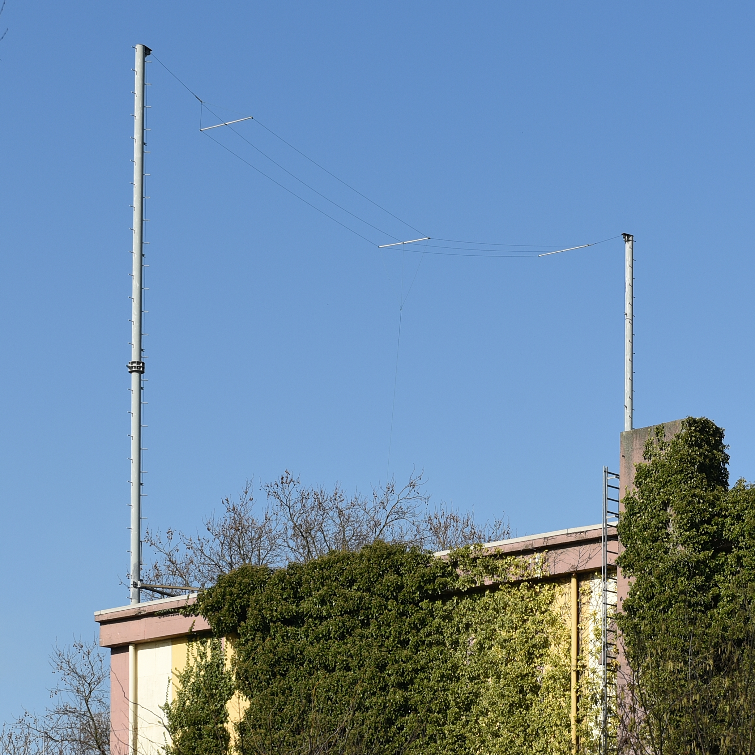 Ungerichtetes Funkfeuer BOT in Bottrop.